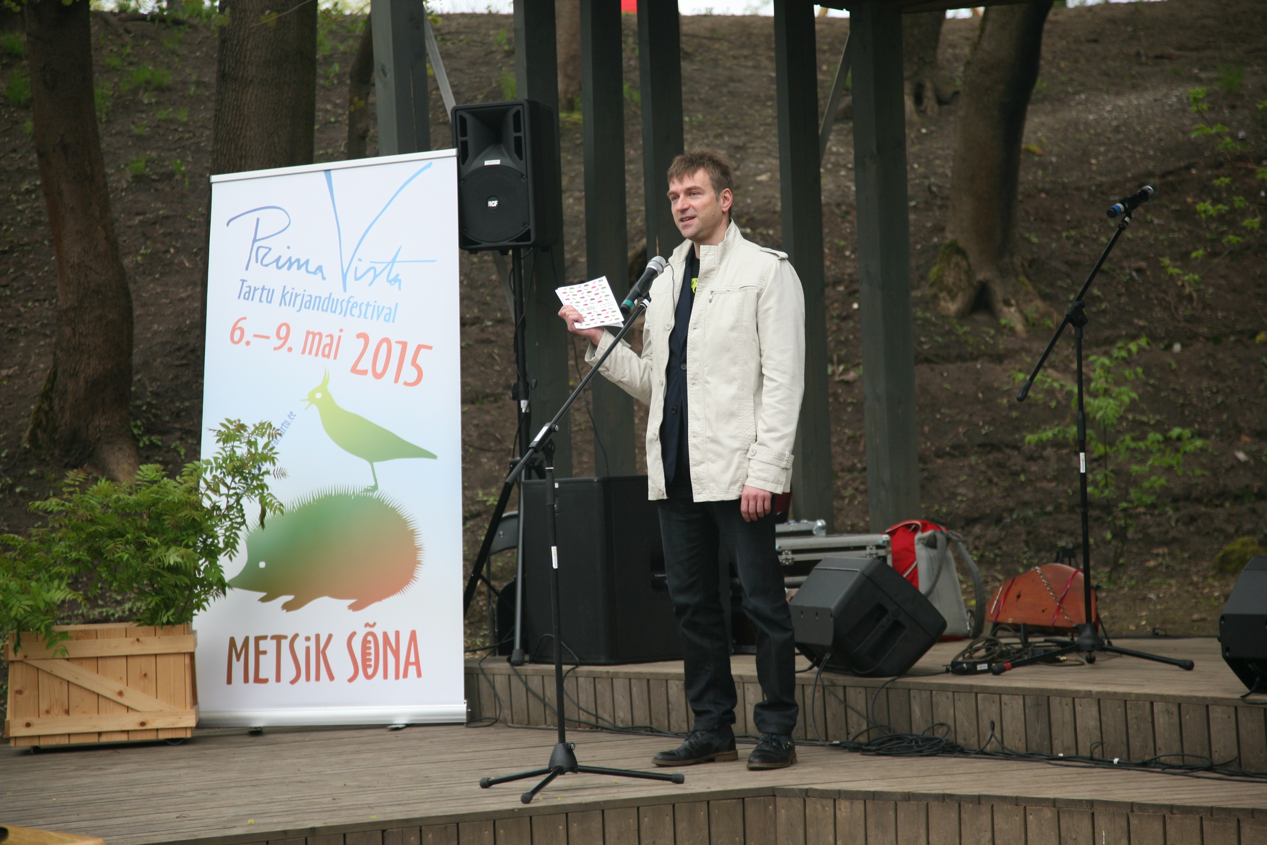 Valdur Mikita Prima Vista 2015 avamisel